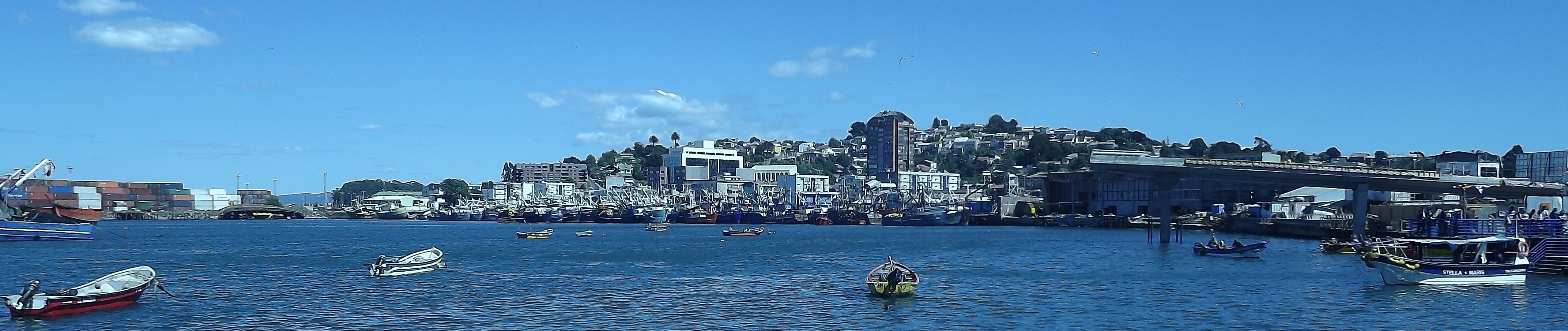 vista desde el mar